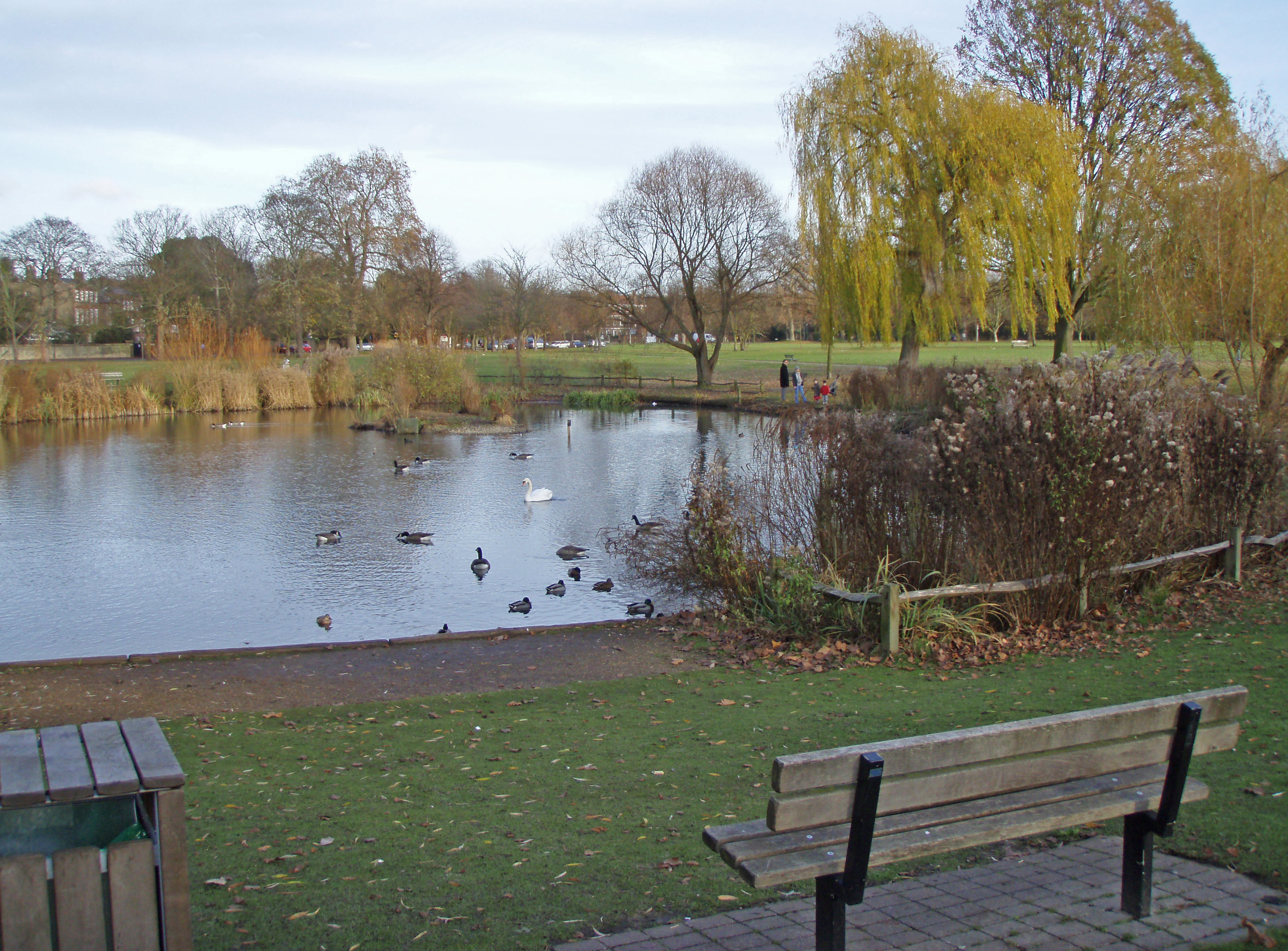 Ham Pond